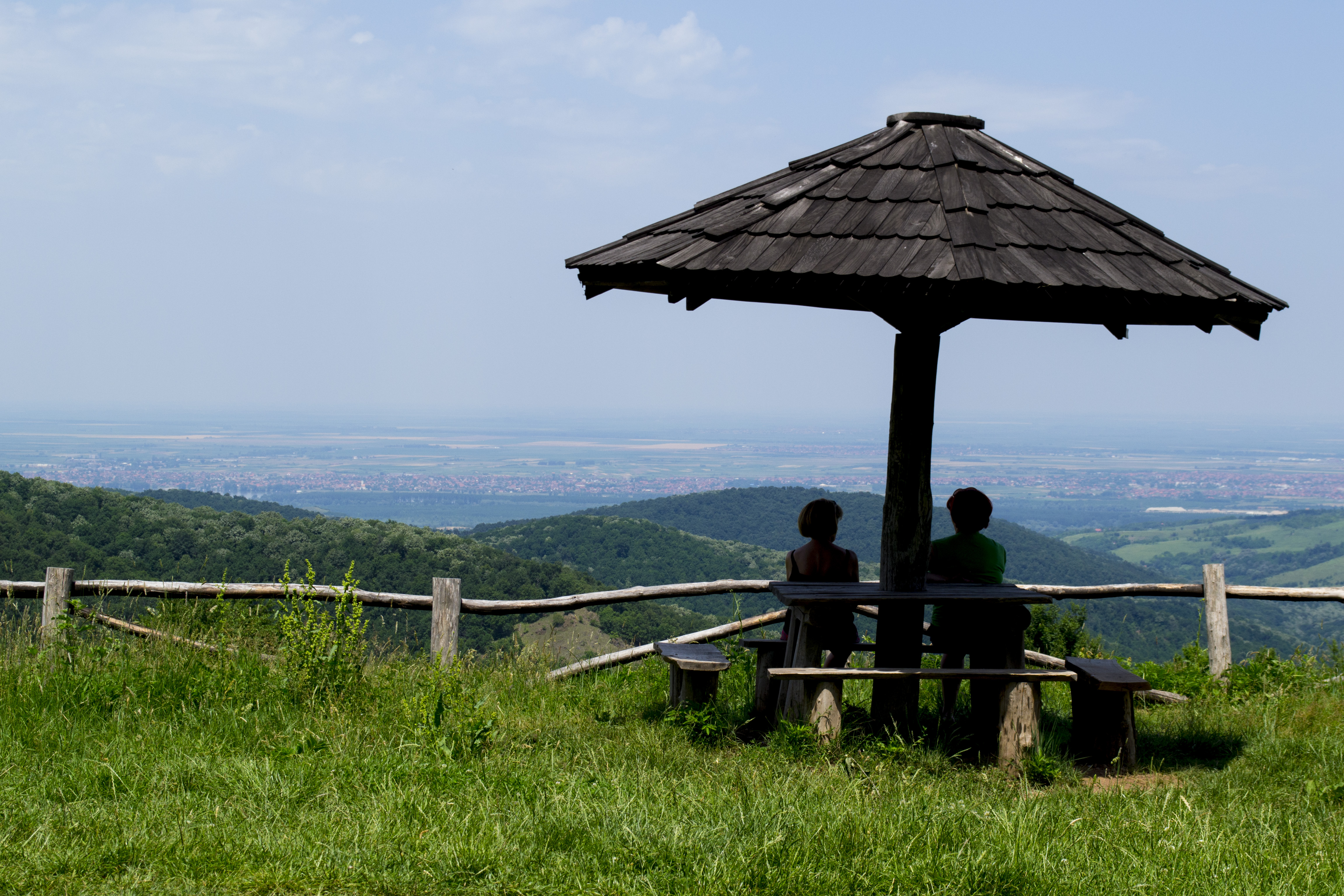 Ово је фотографија заштићеног природног добра у Србији под шифром: НП01This is a a photo of a natural area in Serbia with ID: НП01 Pogled na Novi Sad sa Fruske Gore, odmaraliste Zmajevac